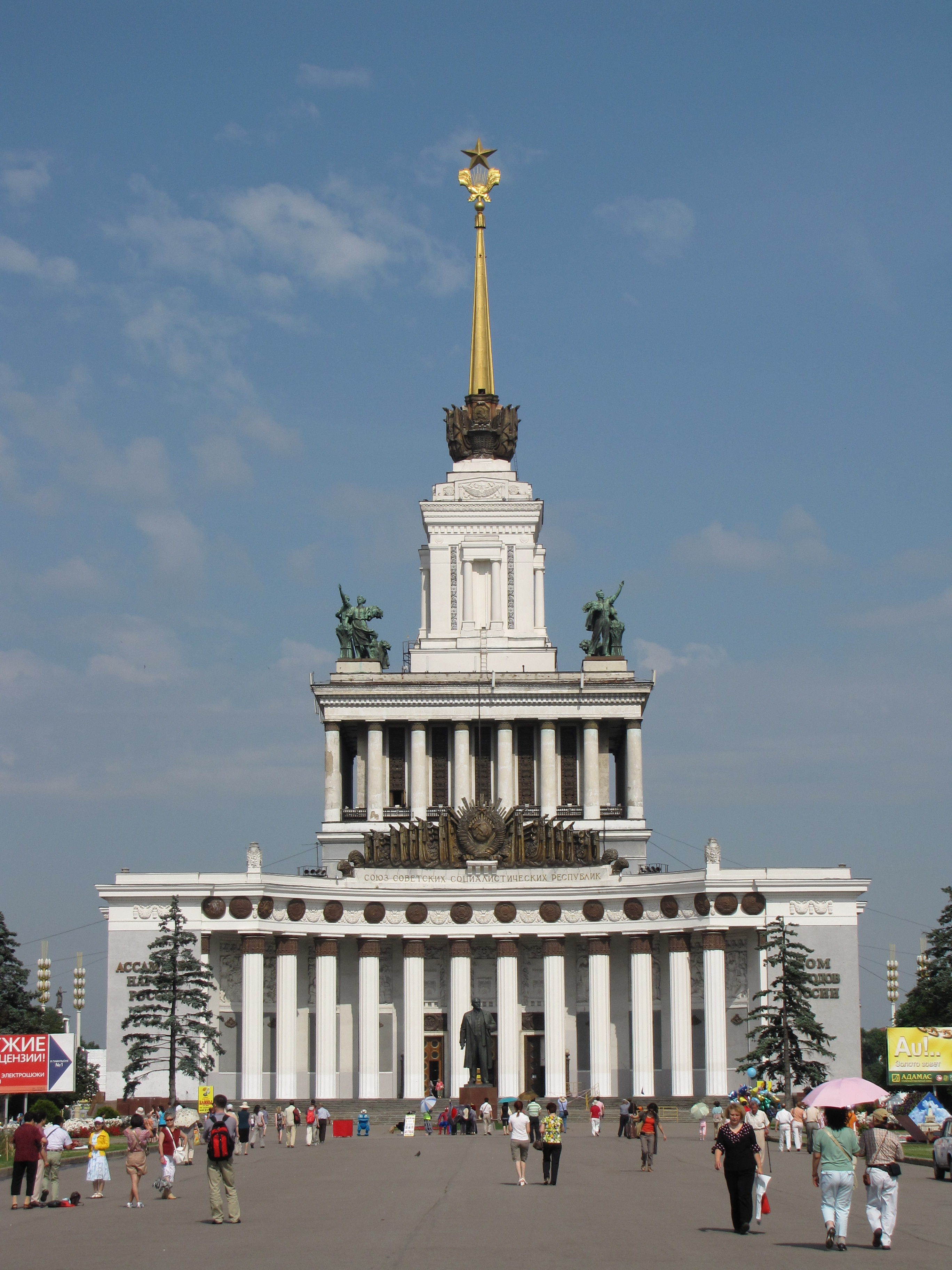 Вид главного павильона в августе 2009 года